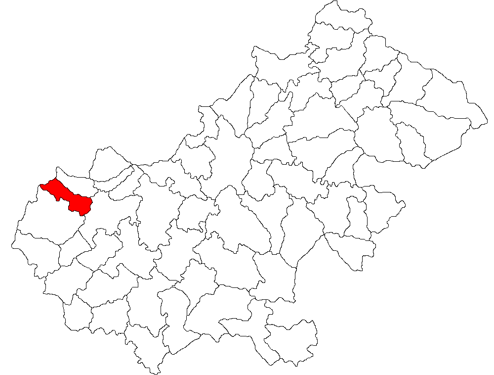 Categorie:Hărţi ale judeţului Satu Mare